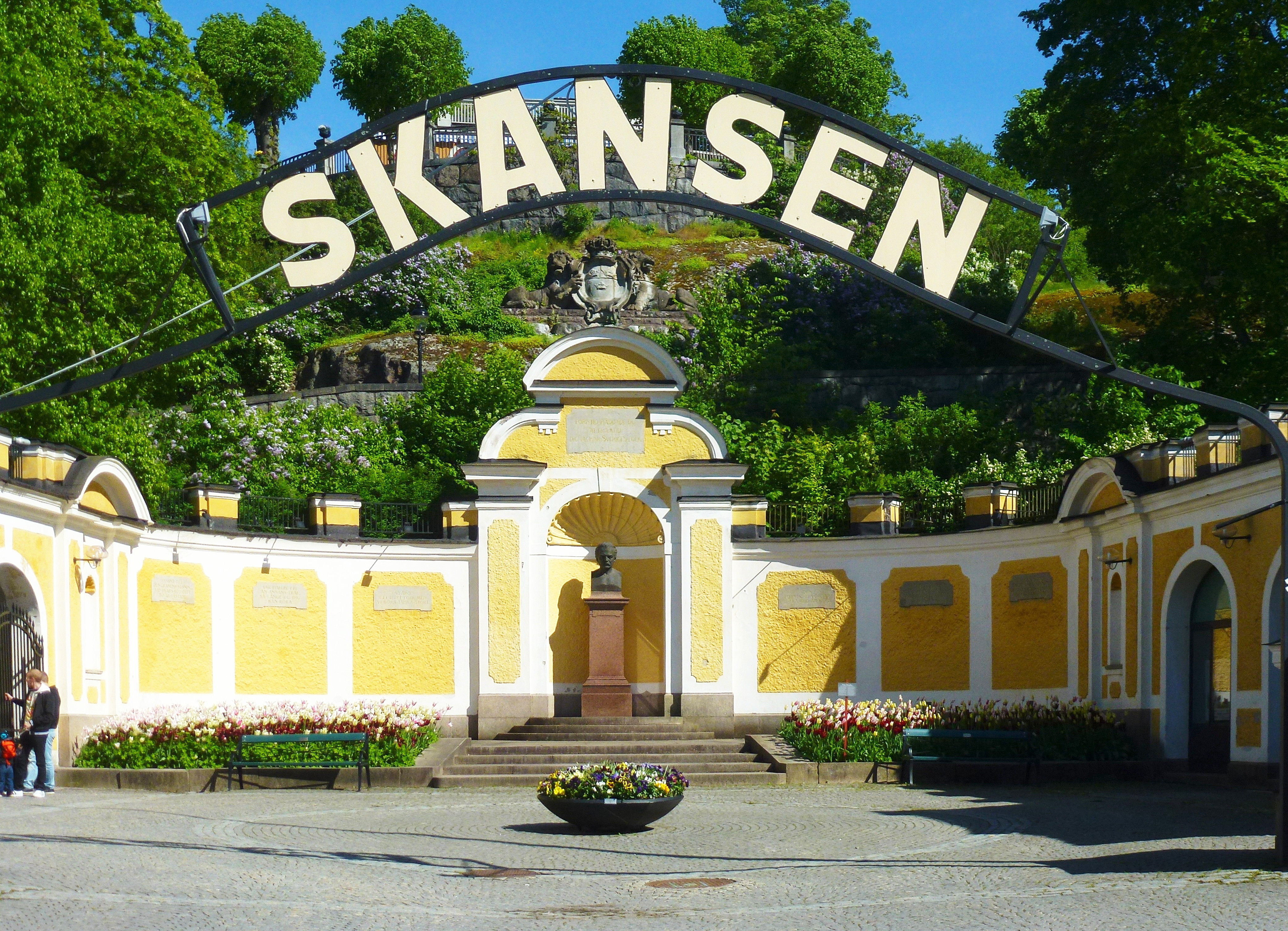 Skansens gamla entré